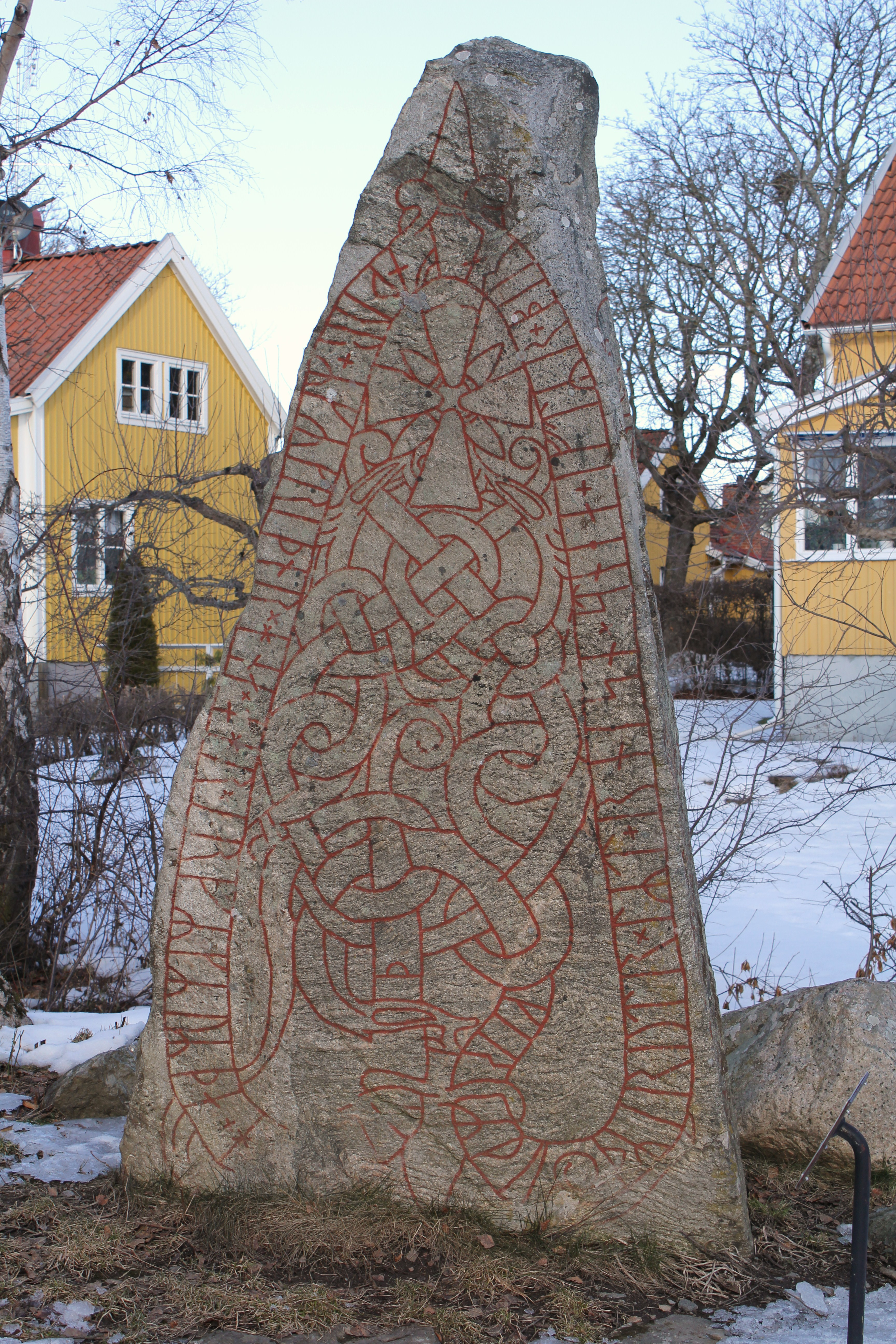 Runstenen U 60 i Norra Ängby, Bromma.